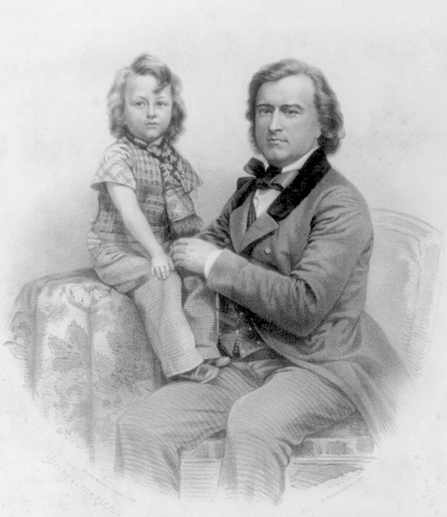 Pierre Soulé (1801-1870)